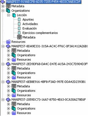 A nivel de paquete dispondrá de una estructura de una única organización con una estructura jerárquica de ítems tan compleja como sea necesaria que refleje lo descrito en la ficha instruccional. En este caso la estructura deberá amoldarse al diseño de la secuenciación. En este caso necesariamente habrá entradas tanto en la parte de Resources como en la parte de Submanifiestos, dado que las secuencias se obtendrán mediante composición de contenidos de nivel 1 y nivel 2.Desde el punto de vista SCORM se tratará en la mayor parte de los casos de contenidos de tipo SCO (dado que la navegación y secuenciación se hace explícitamente mediante llamadas a la API de JavaScript y mediante la inserción de reglas de secuenciación del IMS SS). Sin embargo también puede que haya contenidos de tipo Asset (aquellas secuencias en las que existe una secuenciación libre o guiada).